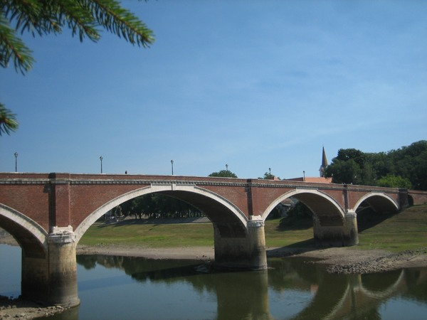 The Old Bridge in Sisak, Croatia. / Sisački Stari most preko Kupe.